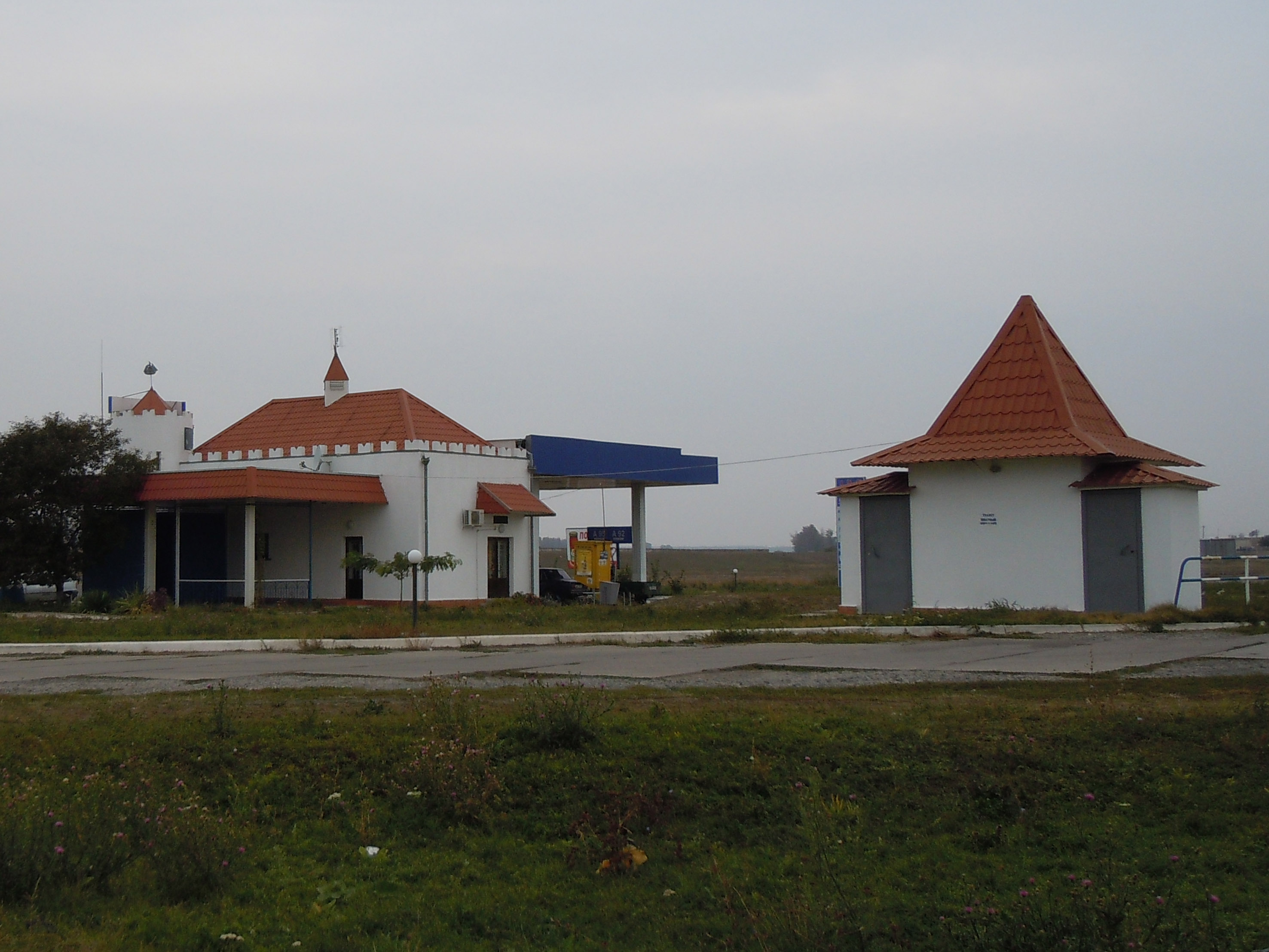 Паливна станція в селі Монаші, Білгород-Дністровський район, Одеська область